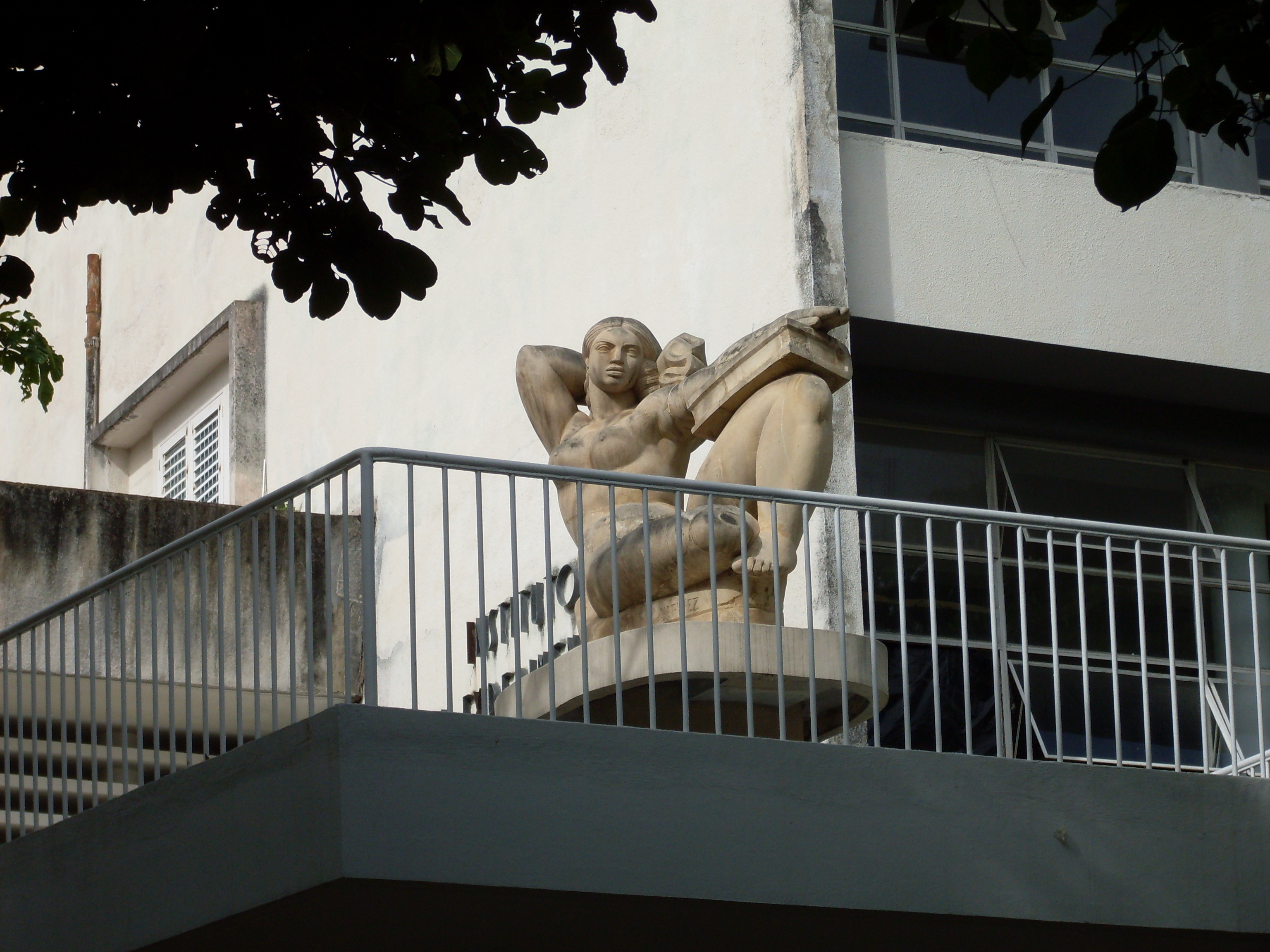 Escultura de Francisco Narváez. Título: La Educación. Autor: Francisco Narváez. Año: 1950. Ubicación: Universidad Central de Venezuela. Instituto de Medicina Experimental. Primer piso, terraza.